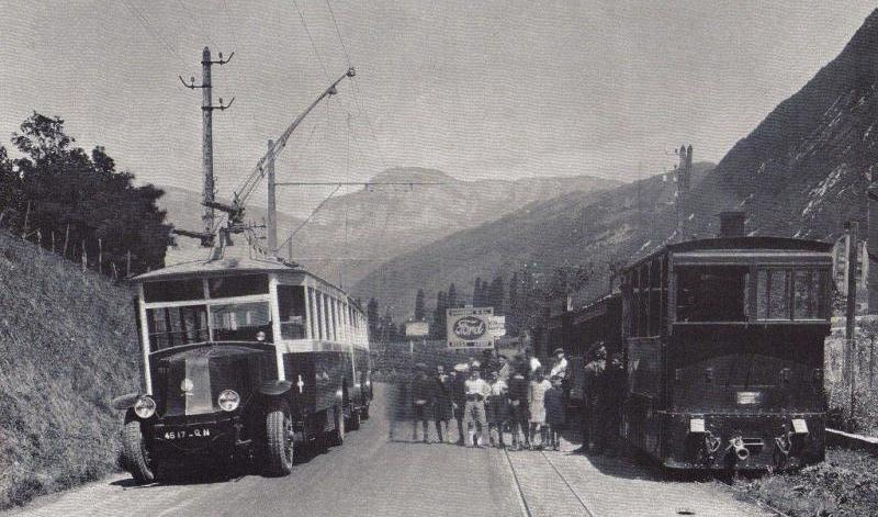 Un électrobus Vétra et un tramway Corpet-Louvet à Challes-les-Eaux en 1930.